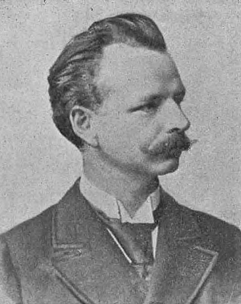 Stanisław Szczepanowski